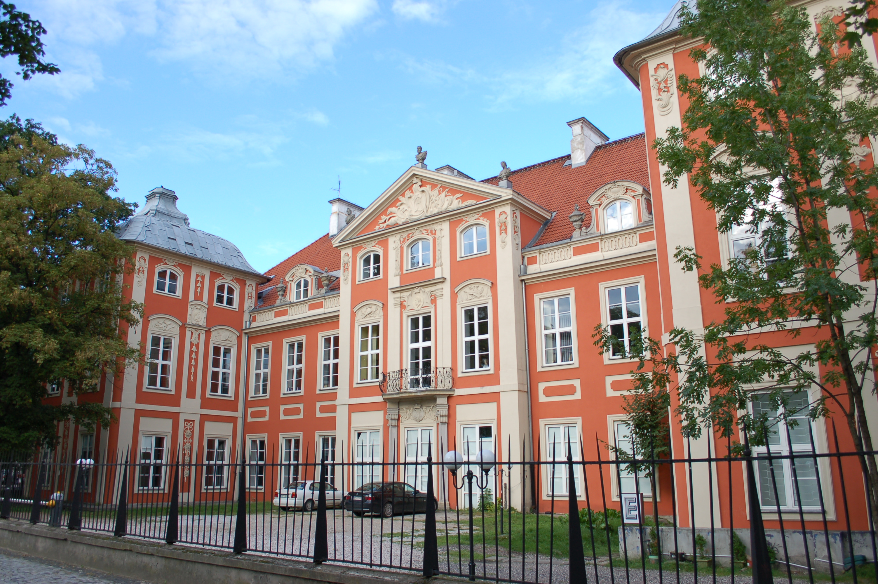 Czapski Palast, Akademie der schönen Künste in Warschau